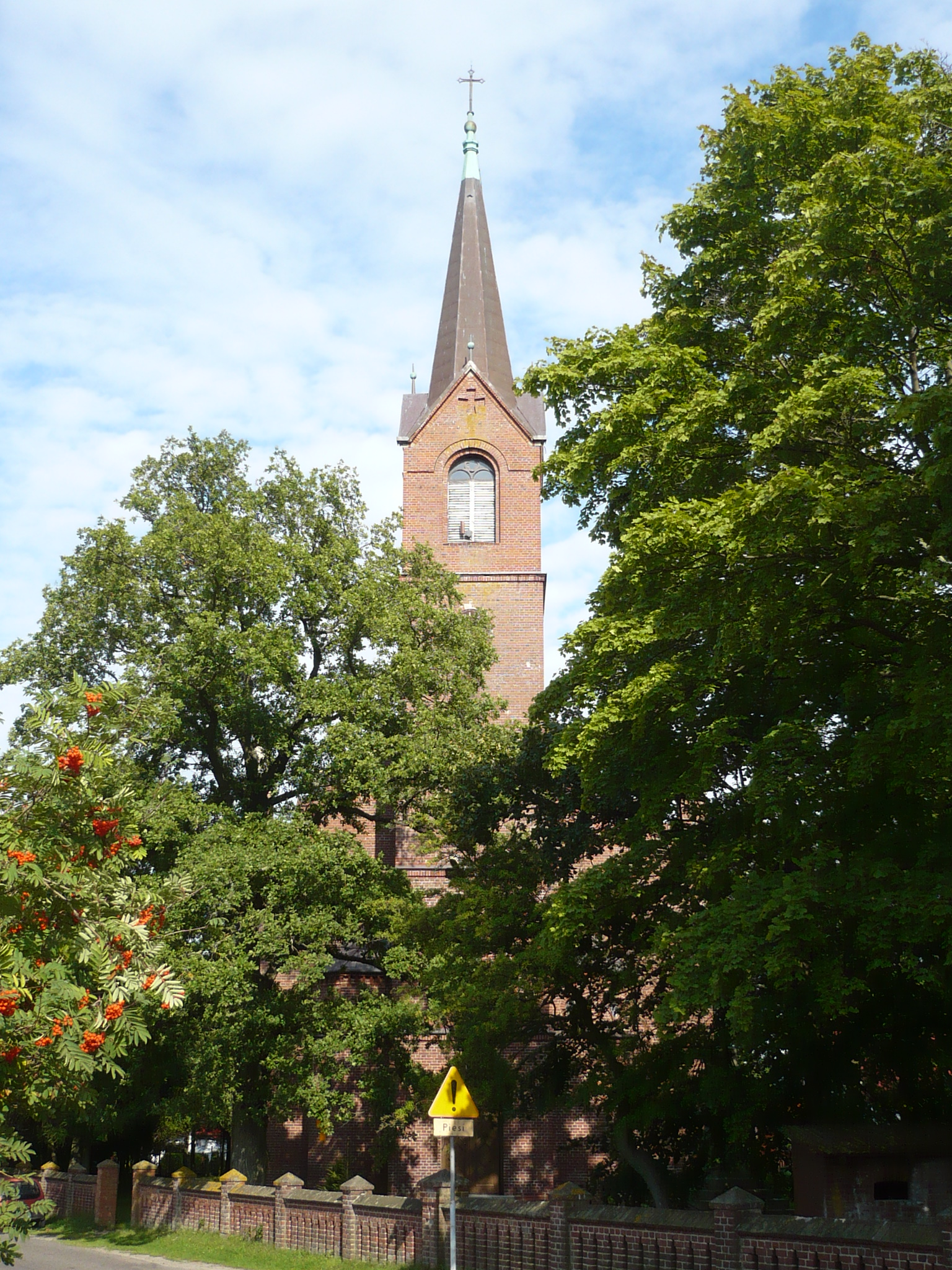 Korzystno, ul. Kościelna 7 - dawny kościół ewangelicki, obecnie rzymskokatolicki parafialny p.w. Chrystusa Króla, 1865-1866.